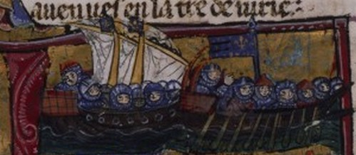 Départ de Louis IX pour la Croisade